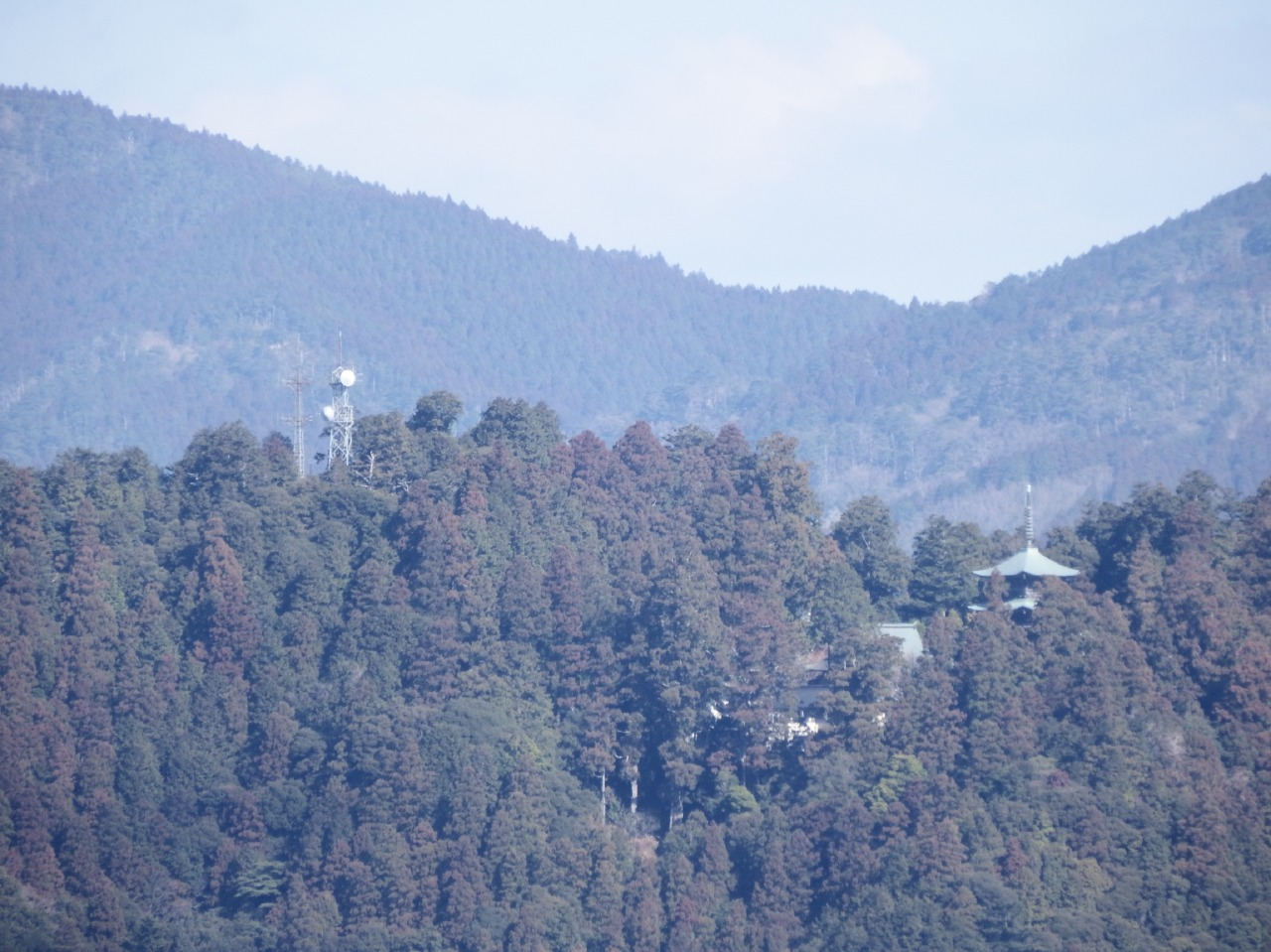 太龍寺から鶴林寺を望む